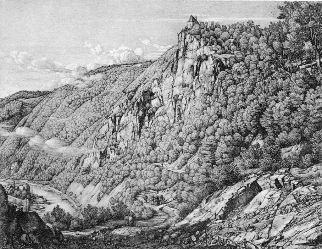 Peter Becker: Kapelle in Taben